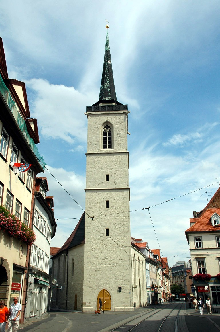 Westturm der Allerheiligenkirche an der Ecke Marktstraße/Allerheiligenstraße in Erfurt